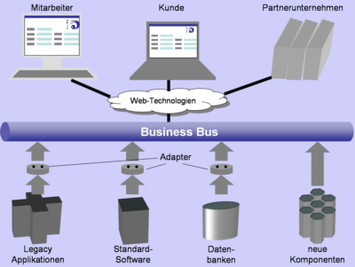 Bizbus